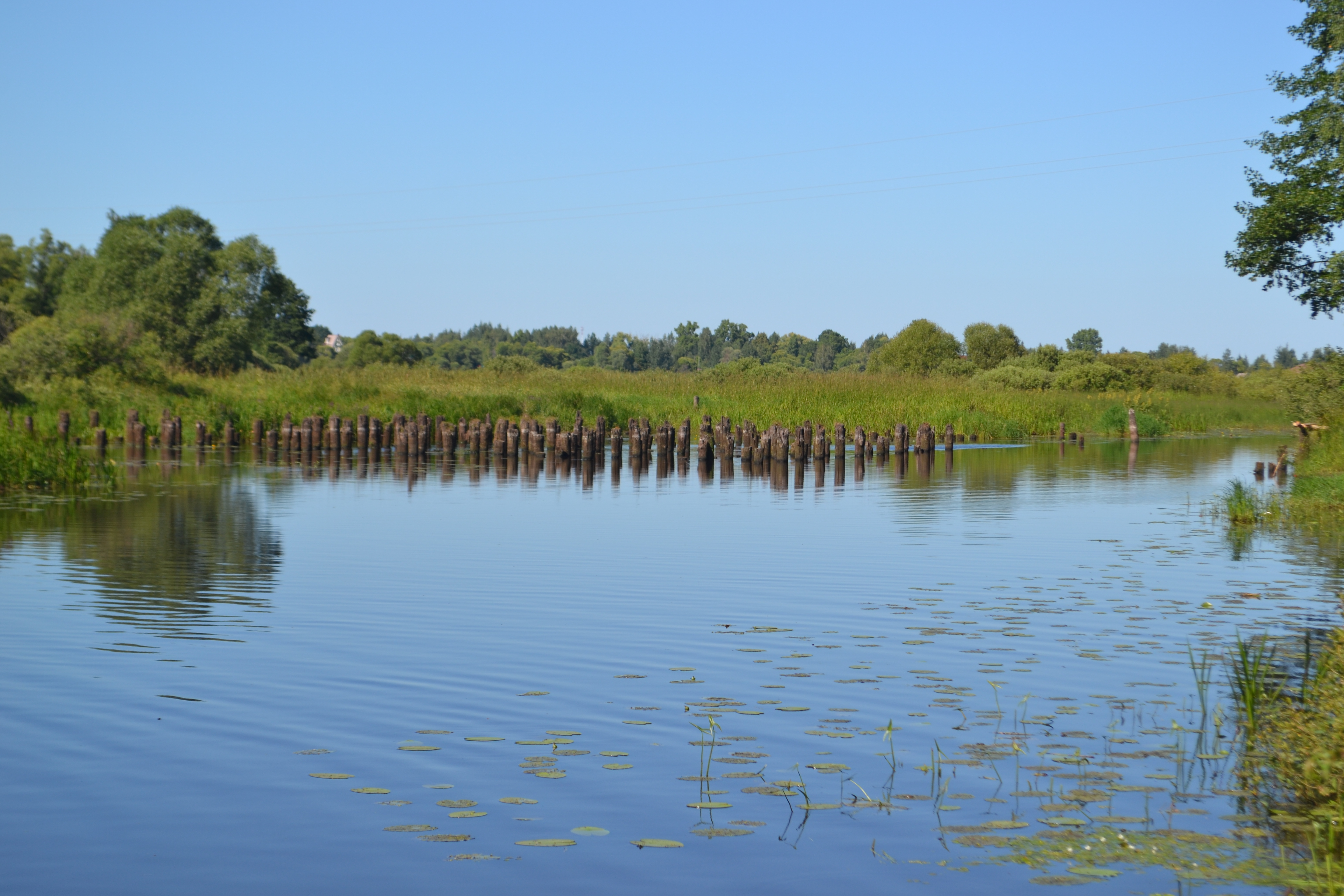 Сваи старого моста около деревни Евлево (Шатурский район)